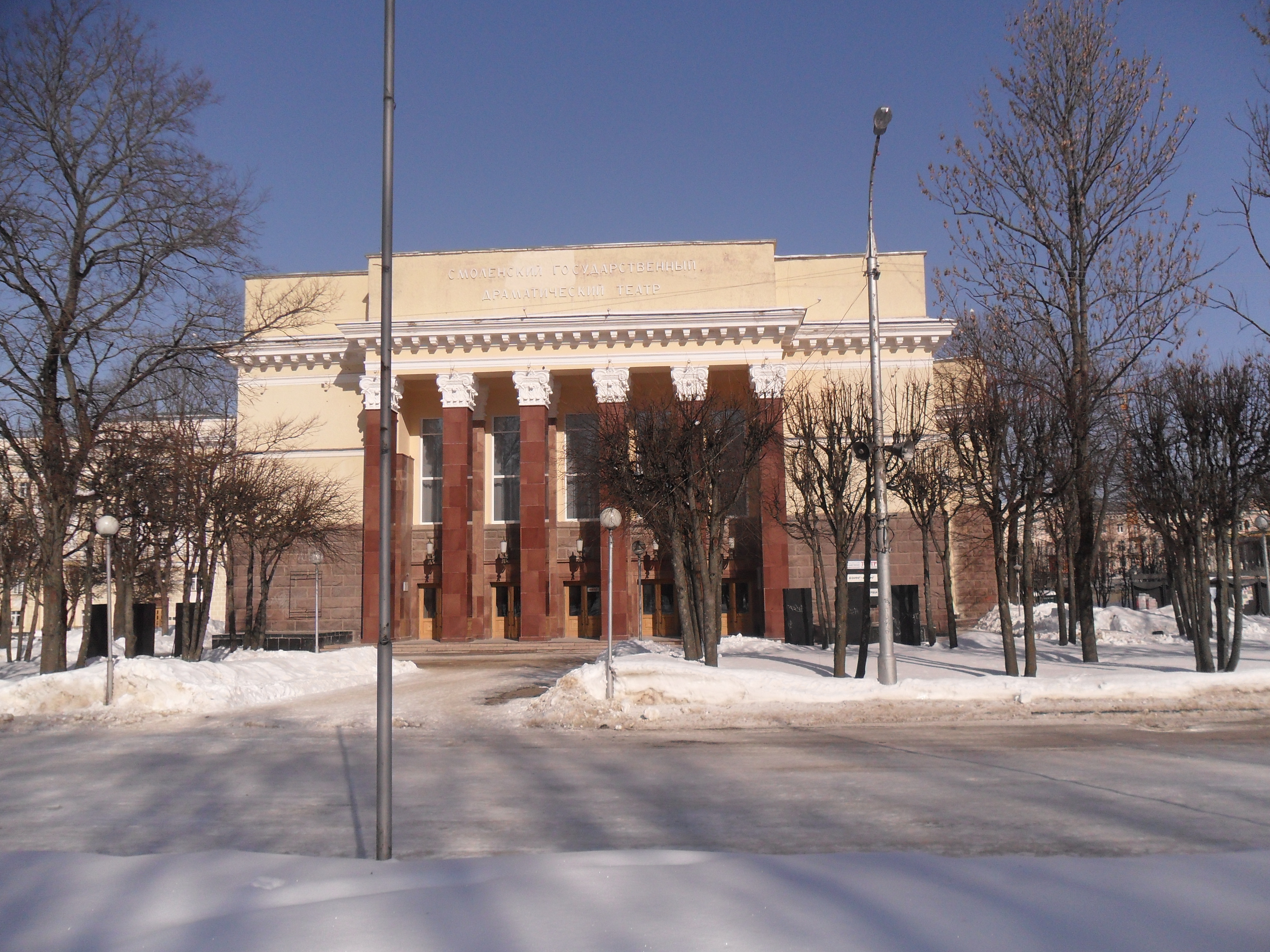 Здание Смоленского драмтеатра.